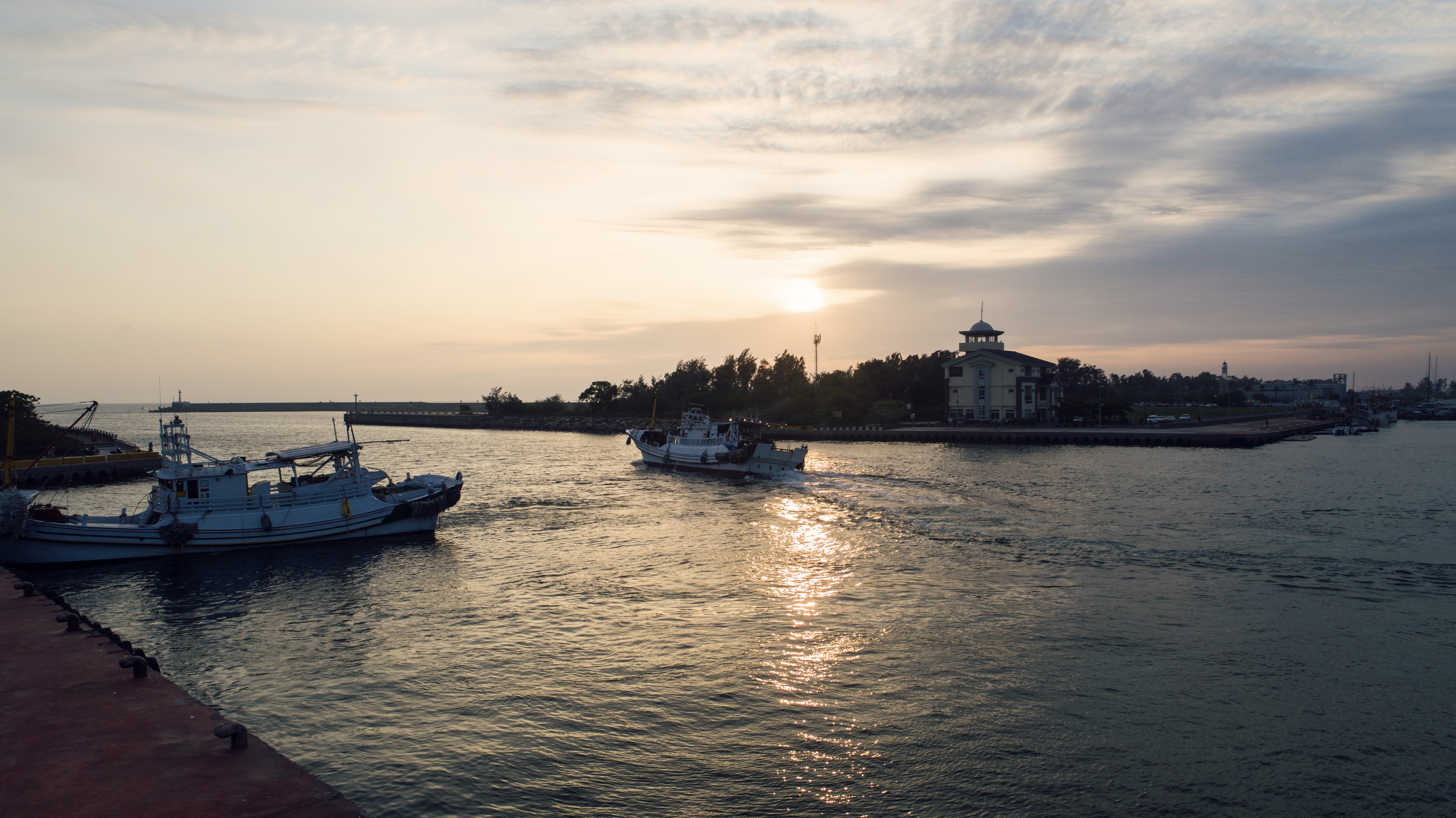 中文（台灣）: 安平商港與漁港安檢所之間。在拍攝期間有取得商港安檢所授權，但在2017年6月份已確定不可再進入拍攝。